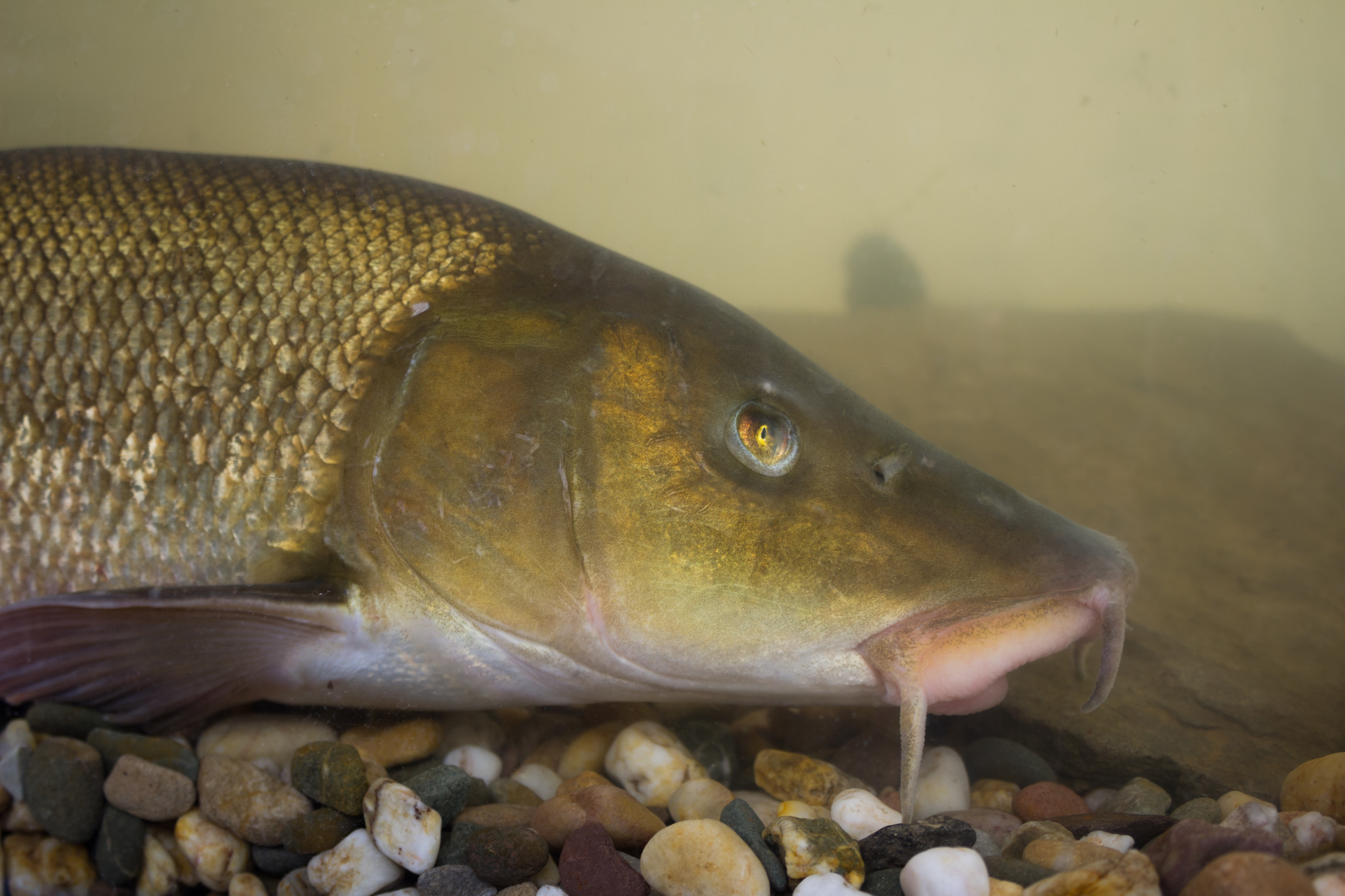 Barbus barbus